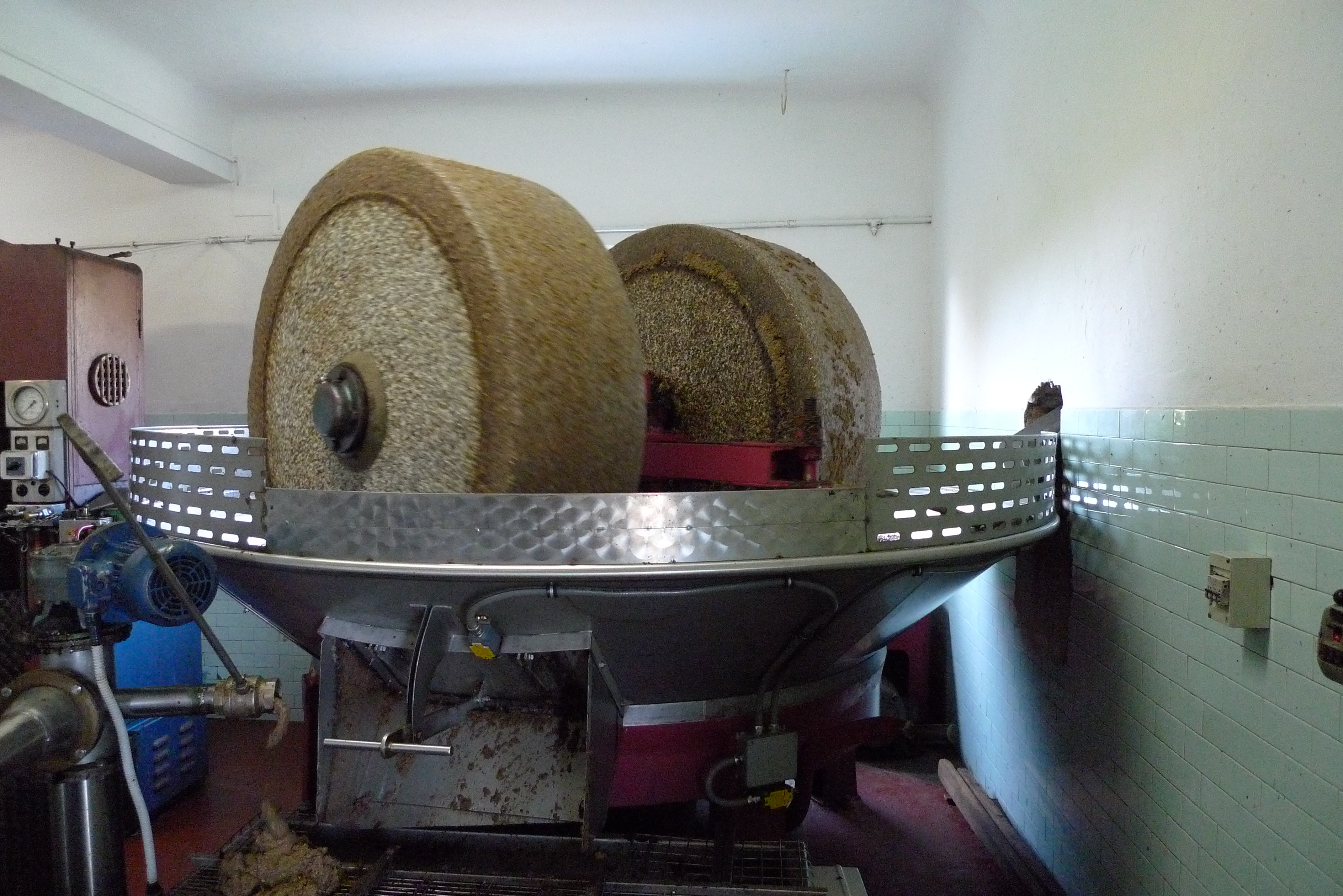 Macina in granito in Italia, oil mill granitstone in Italy.